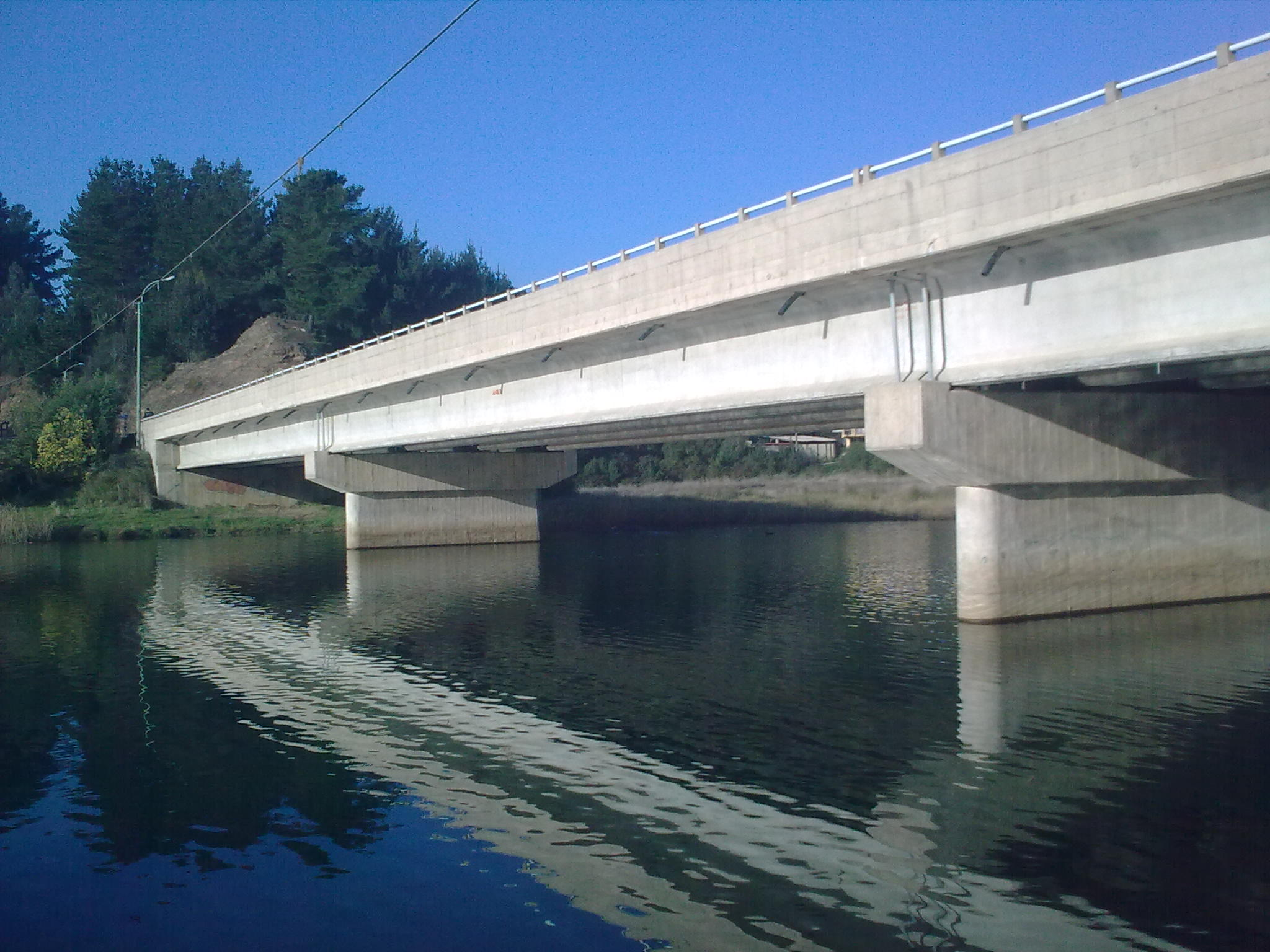 Puente, Rio Chovellén